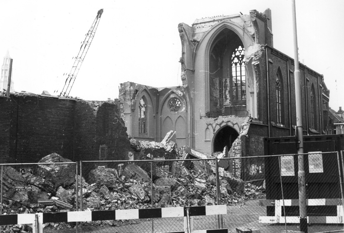 Martinuskerk Groningen demolition